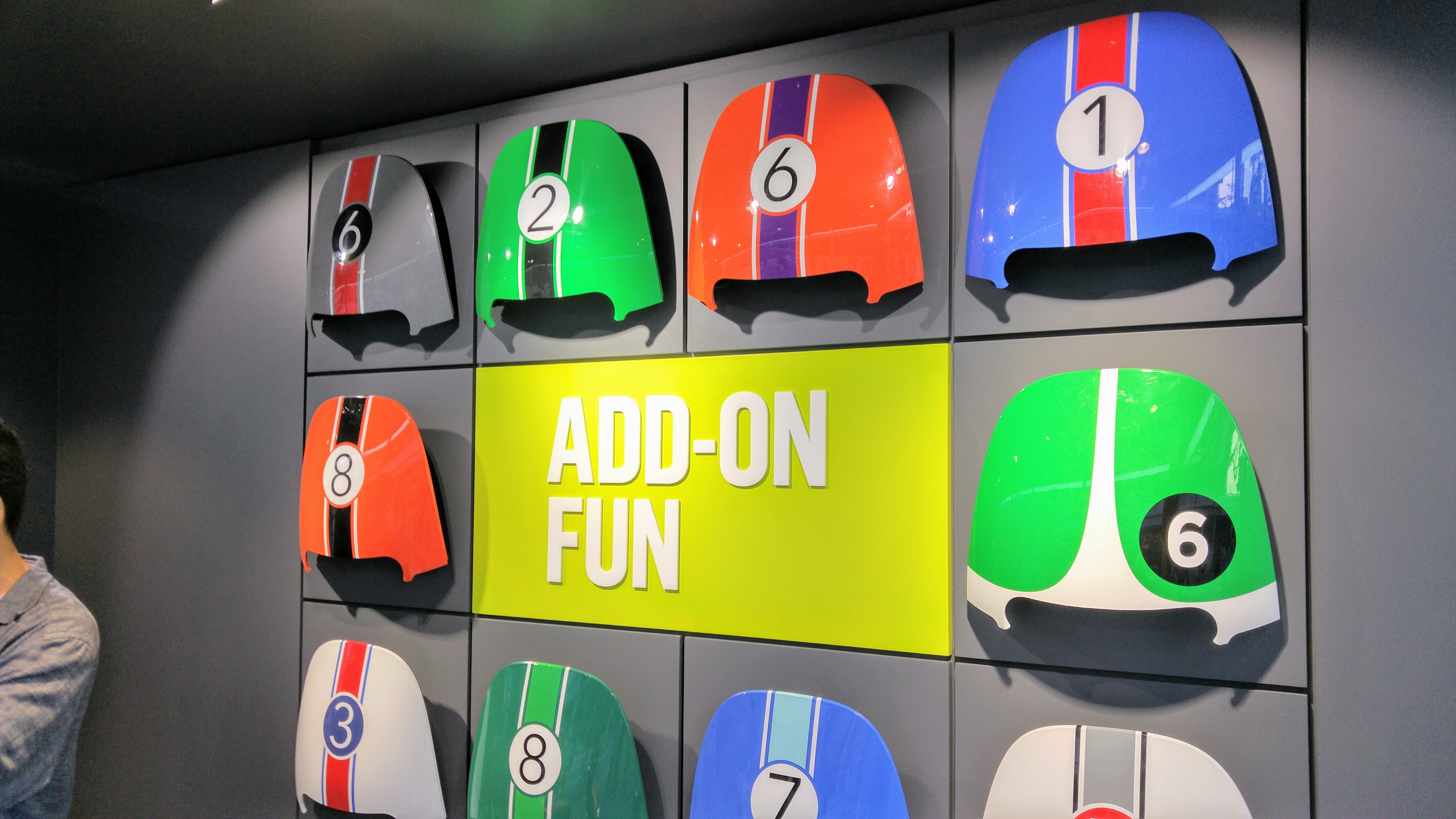 由官方所展示的 Gogoro 1 Series 面板，令車主可依自身喜好購買後進行更換。